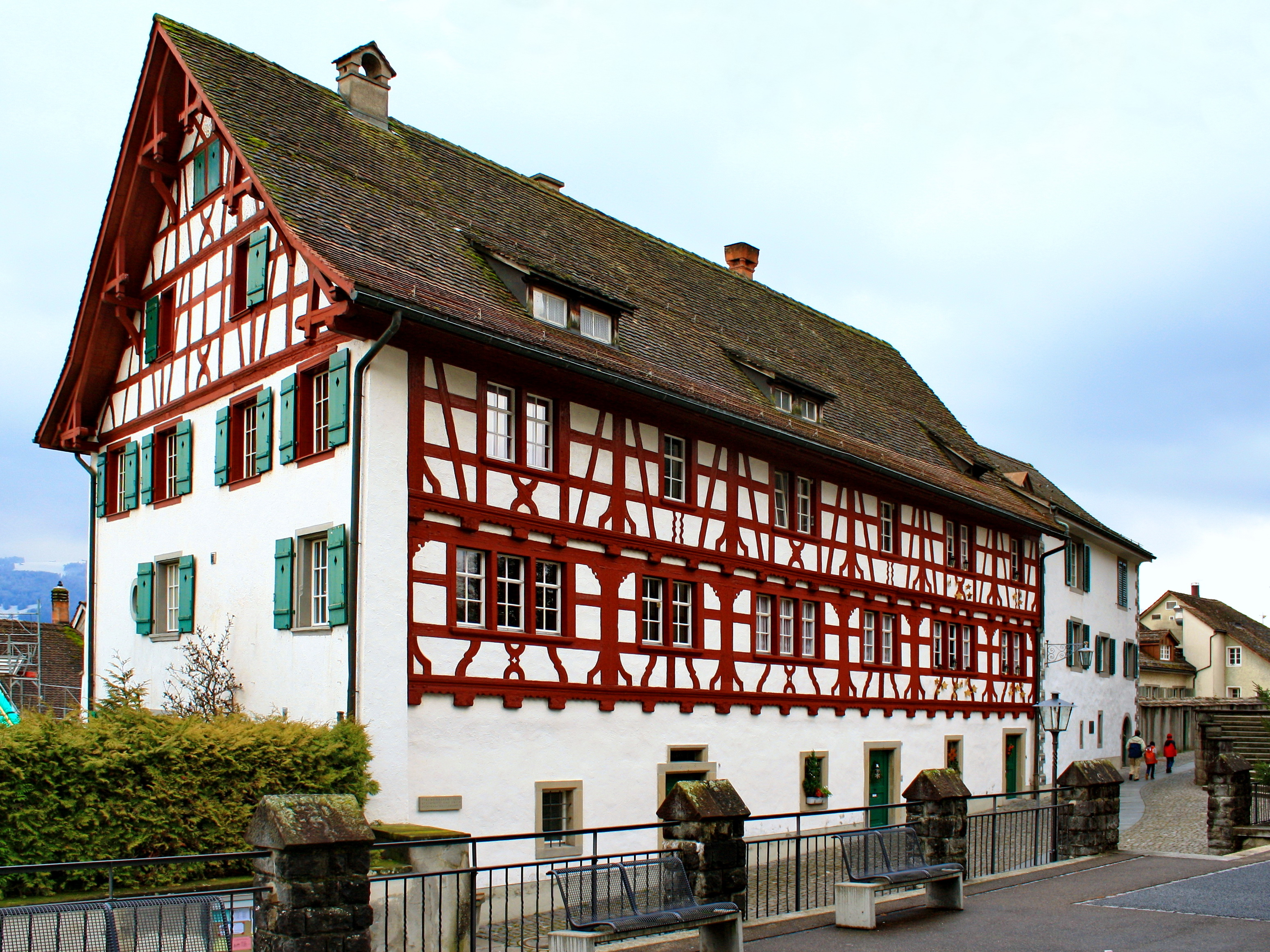 Pfrundhäuser on Herrenberg in Rapperswil (Switzerland)